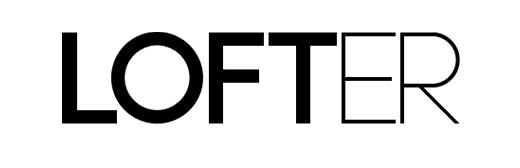 网易LOFTER 标志